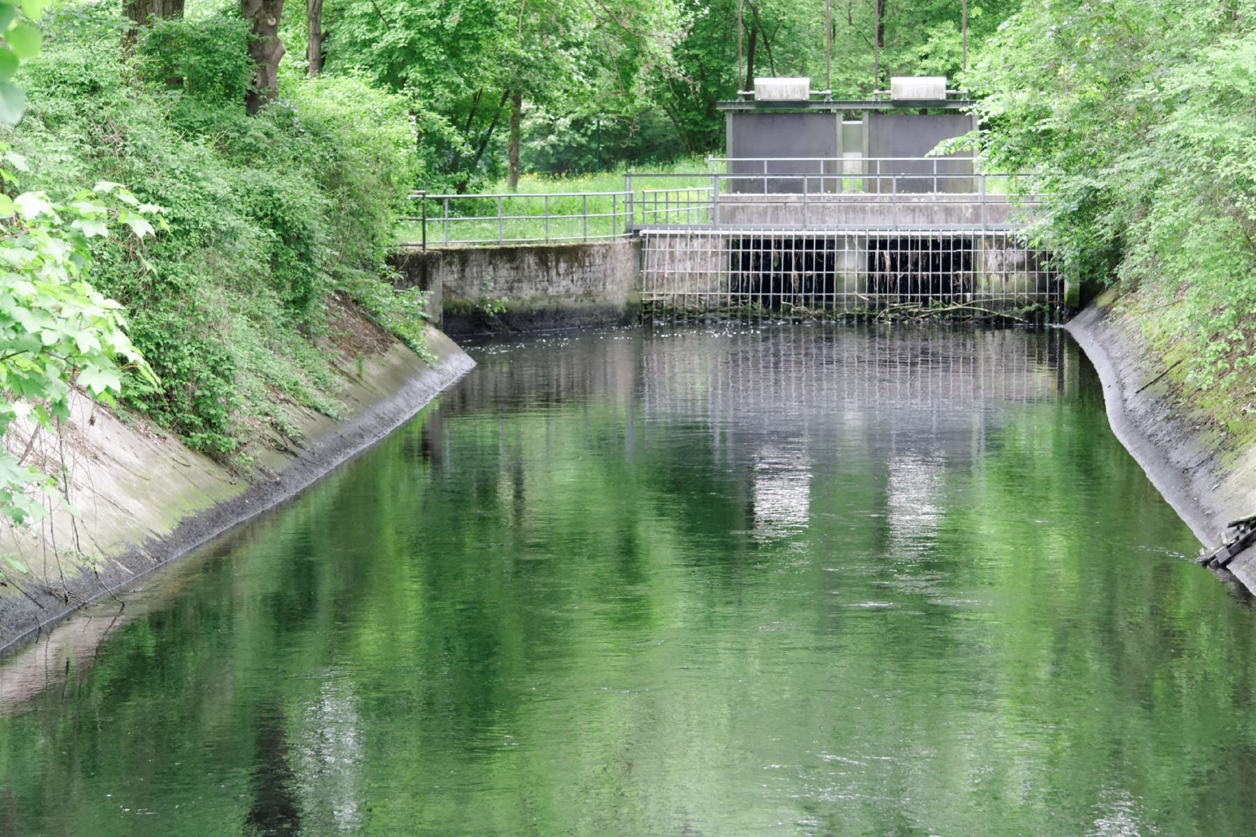 München, Abwasserkanal der Kläranlage Großlappen an seinem oberirdischen Ende